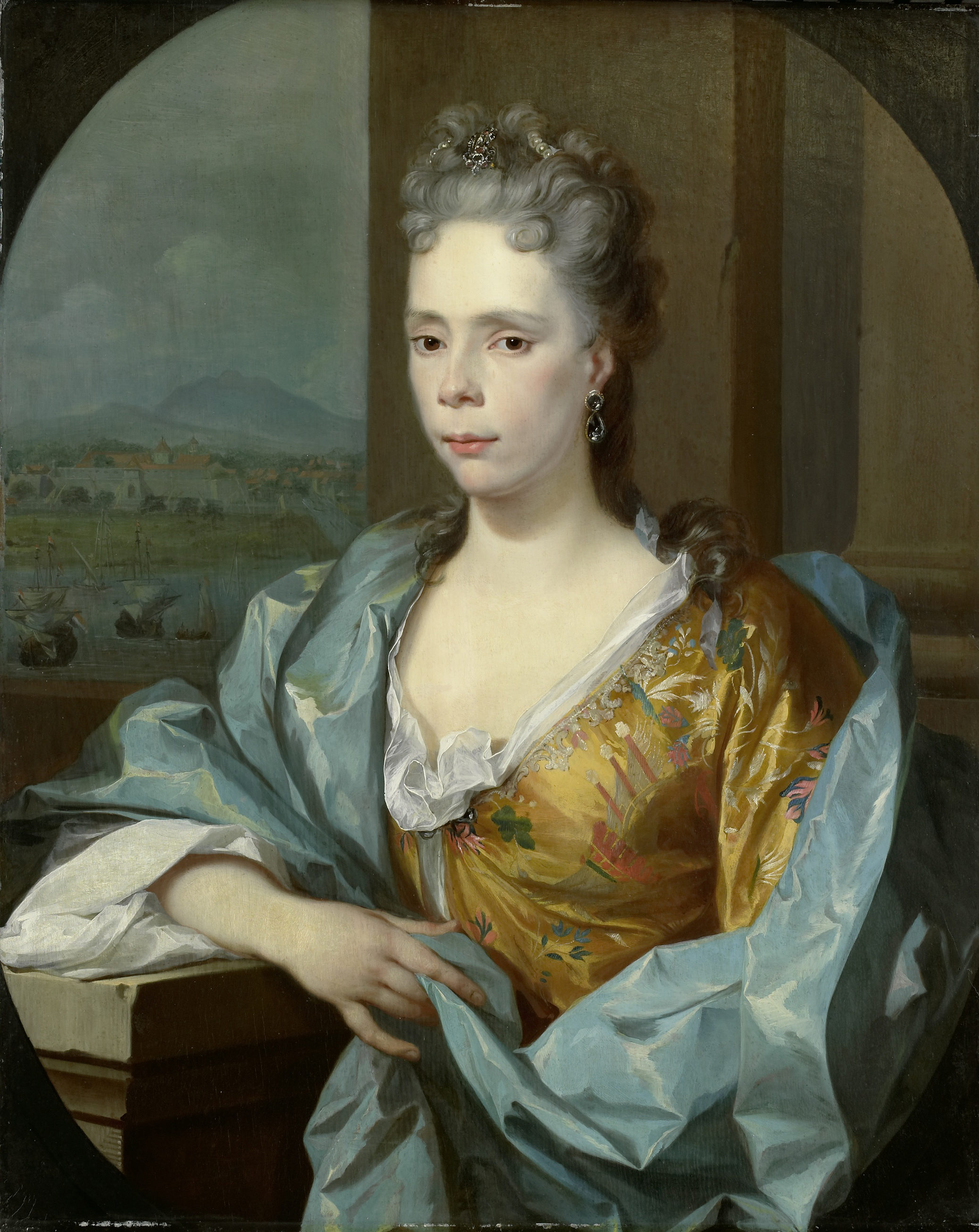 Portret van Elisabeth van Riebeeck (1693-1723), dochter van Abraham van Riebeeck, echtgenote van Gerard van Oosten (1693-1723). Ten halven lijve, voor een balustrade, in het verschiet een gezicht op een vesting gelegen aan een baai met schepen.